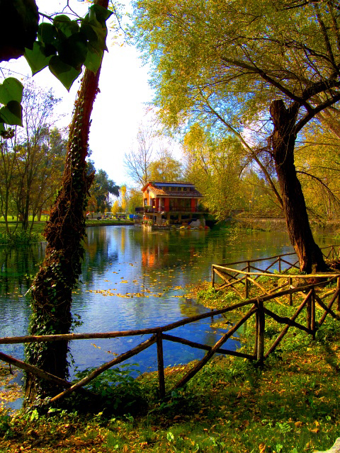 Parco delle sorgenti del Rio Grassano, San Salvatore Telesino (BN)